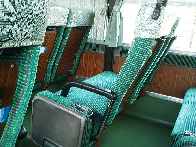 神姫ワンロマ車の座席